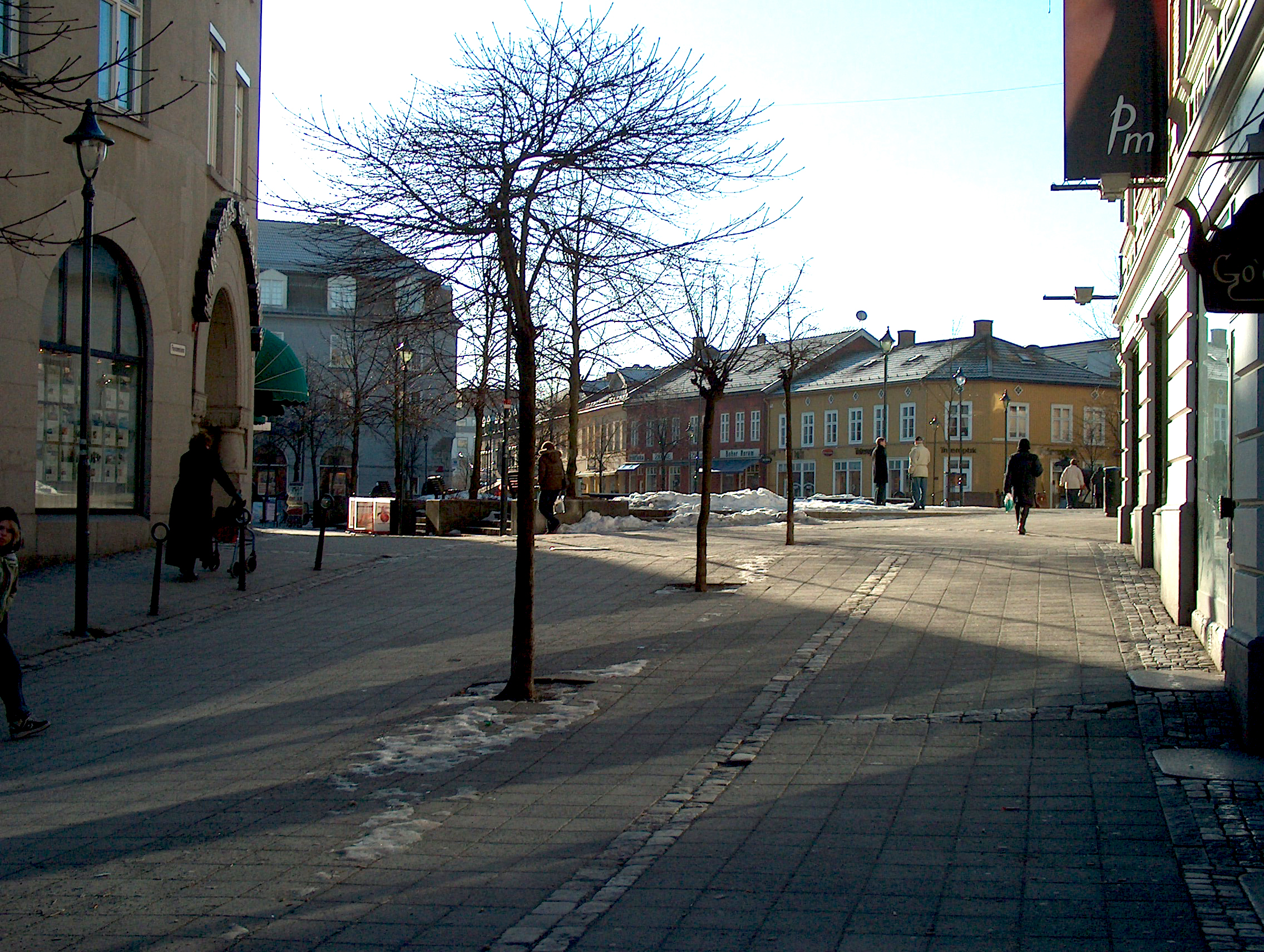 Søndre torv i Hønefoss (Hønefoss City Square)